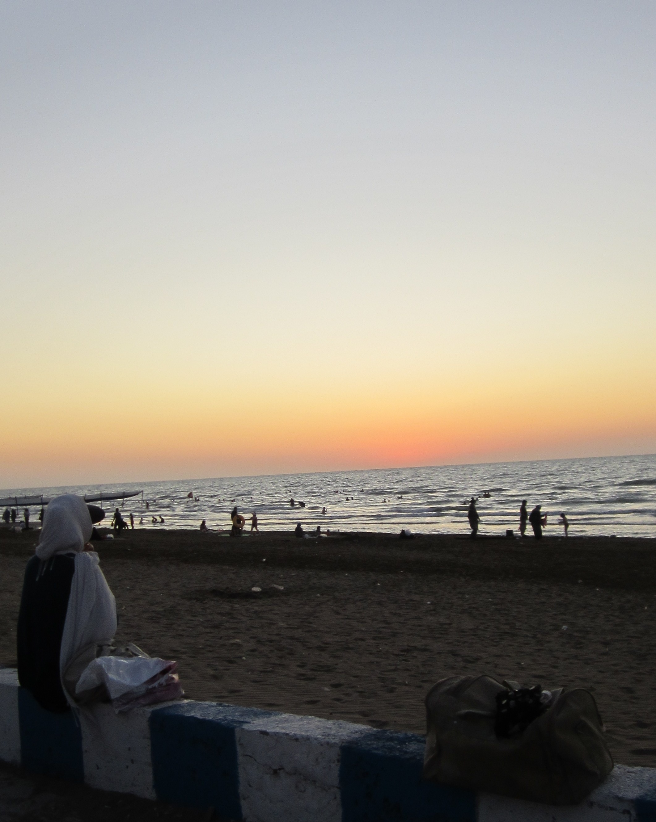 دخترکی در ساحل دریای کاسپین (ساری) چه زار-زار به مردهای آزاد و قید و بند خویش در ساحلی که غروب تعطیل شده می‌نگرد...!؟